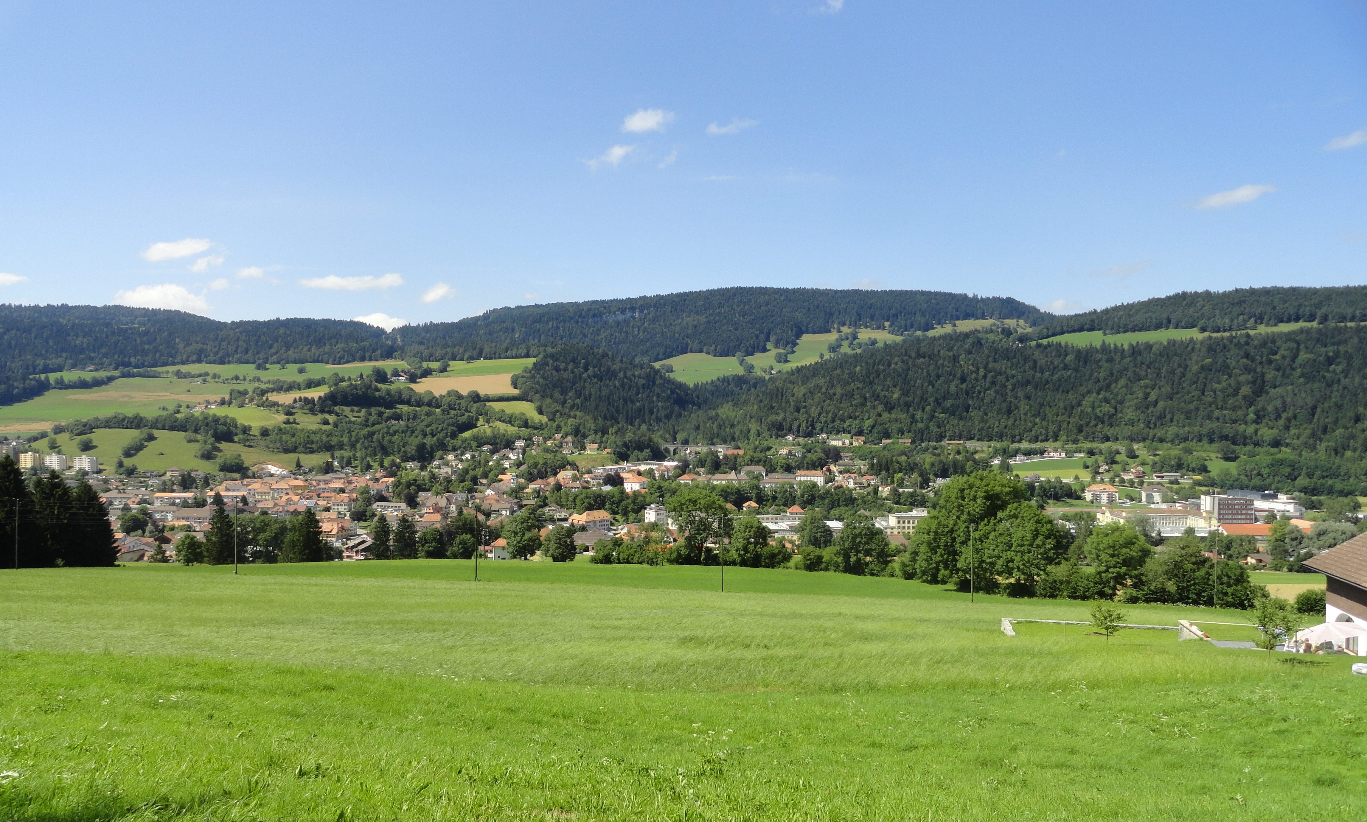 Couvet